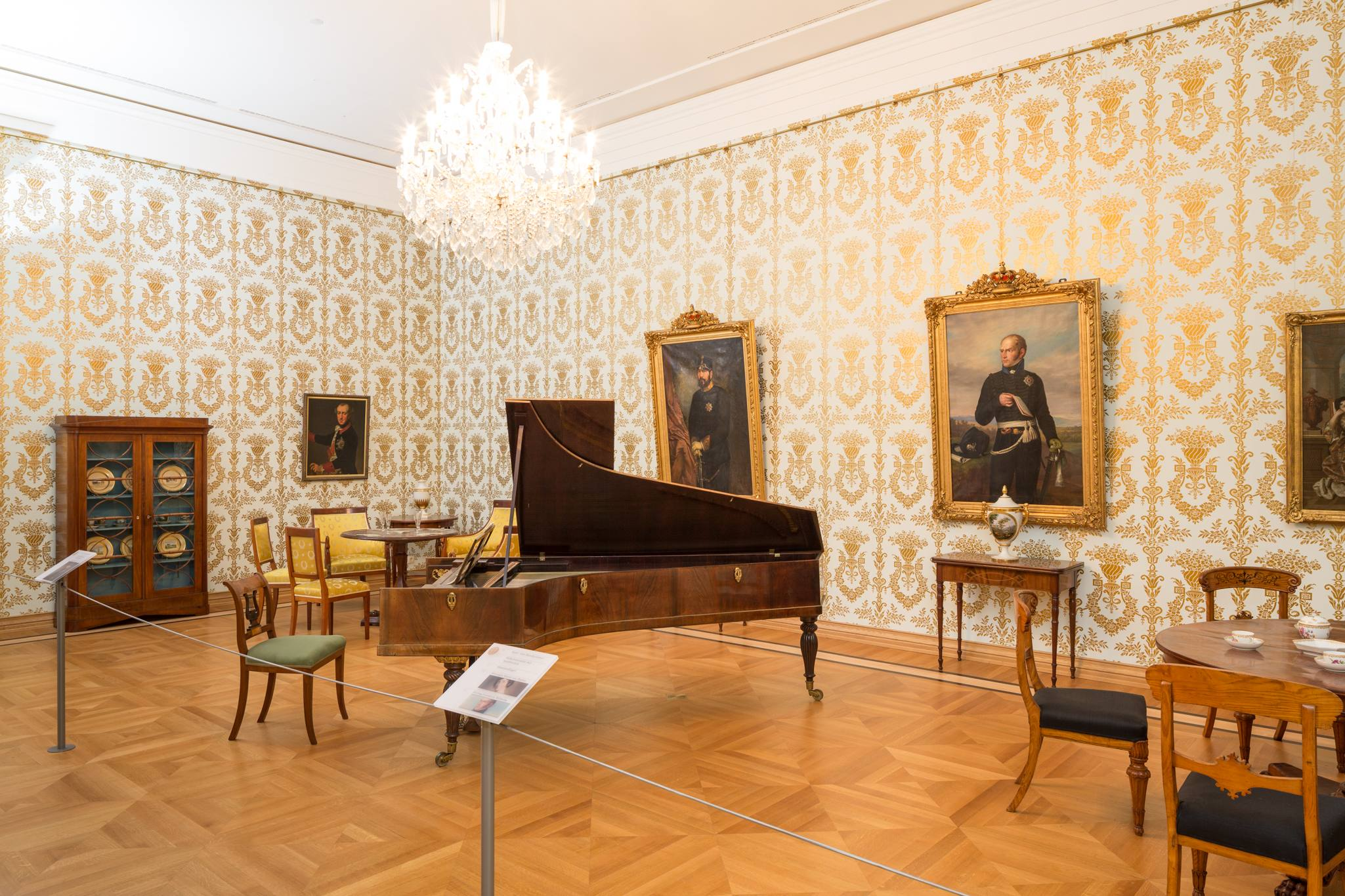 Das Bild zeigt das Spiel- und Musikzimmer im Schlossmuseum Braunschweig